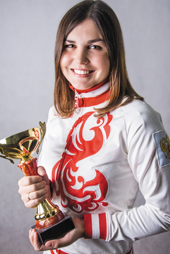 Лариса Ильченко. Российская пловчиха, первая в истории олимпийская чемпионка на дистанции 10 км (открытая вода), единственная в истории российского женского плавания 8-кратная чемпионка мира. Заслуженный мастер спорта России. Фотография из серии «Лица эстафеты».